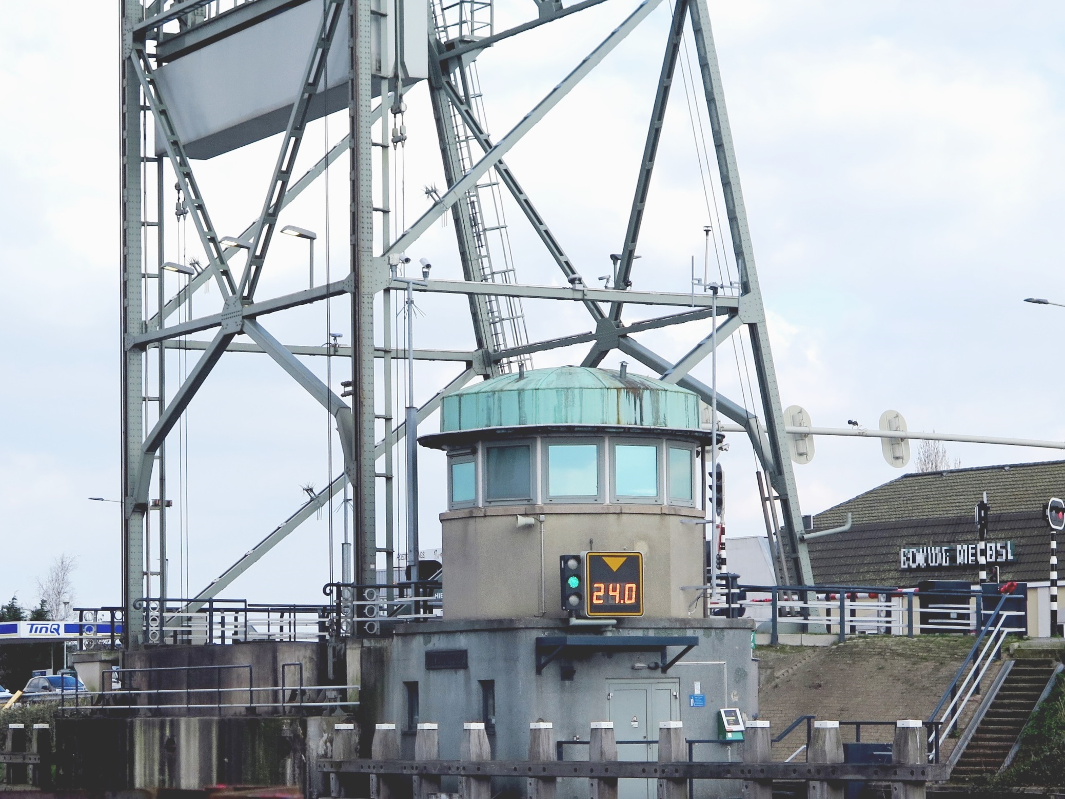 Hefbrug Waddinxveen - Brugwachtershuisje met matrixbord